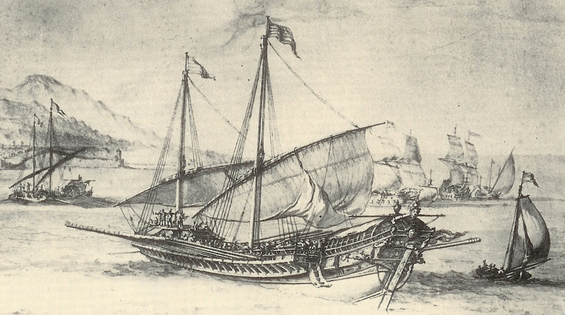 Portion d'un dessin à la plume de Pierre Puget dessiné entre fr:1655 et fr:1660 sur un velin de 37x51 cm. Musée des Beaux Arts "Vaisseaux dans la rade de Marseille" présentant des Galères.